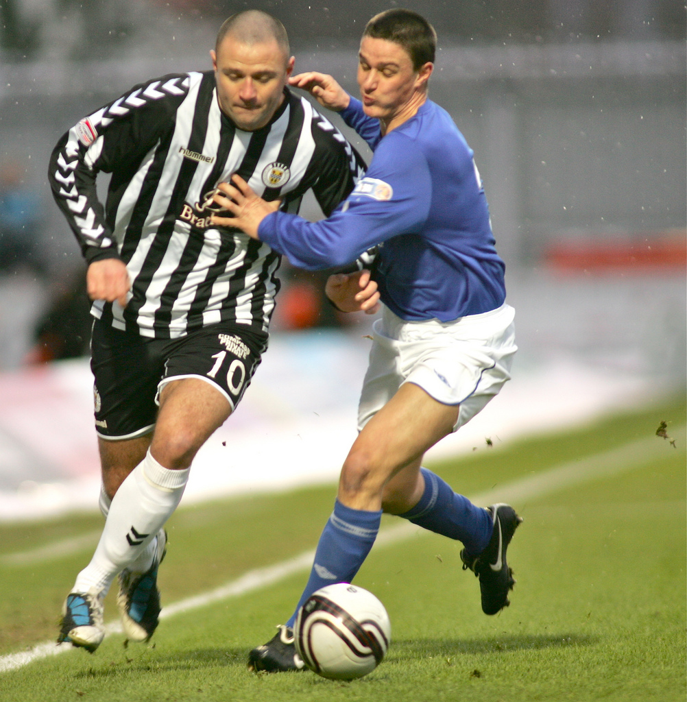 St Mirren vs Peterhead